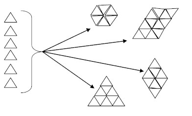 Schema sviluppo Frattale